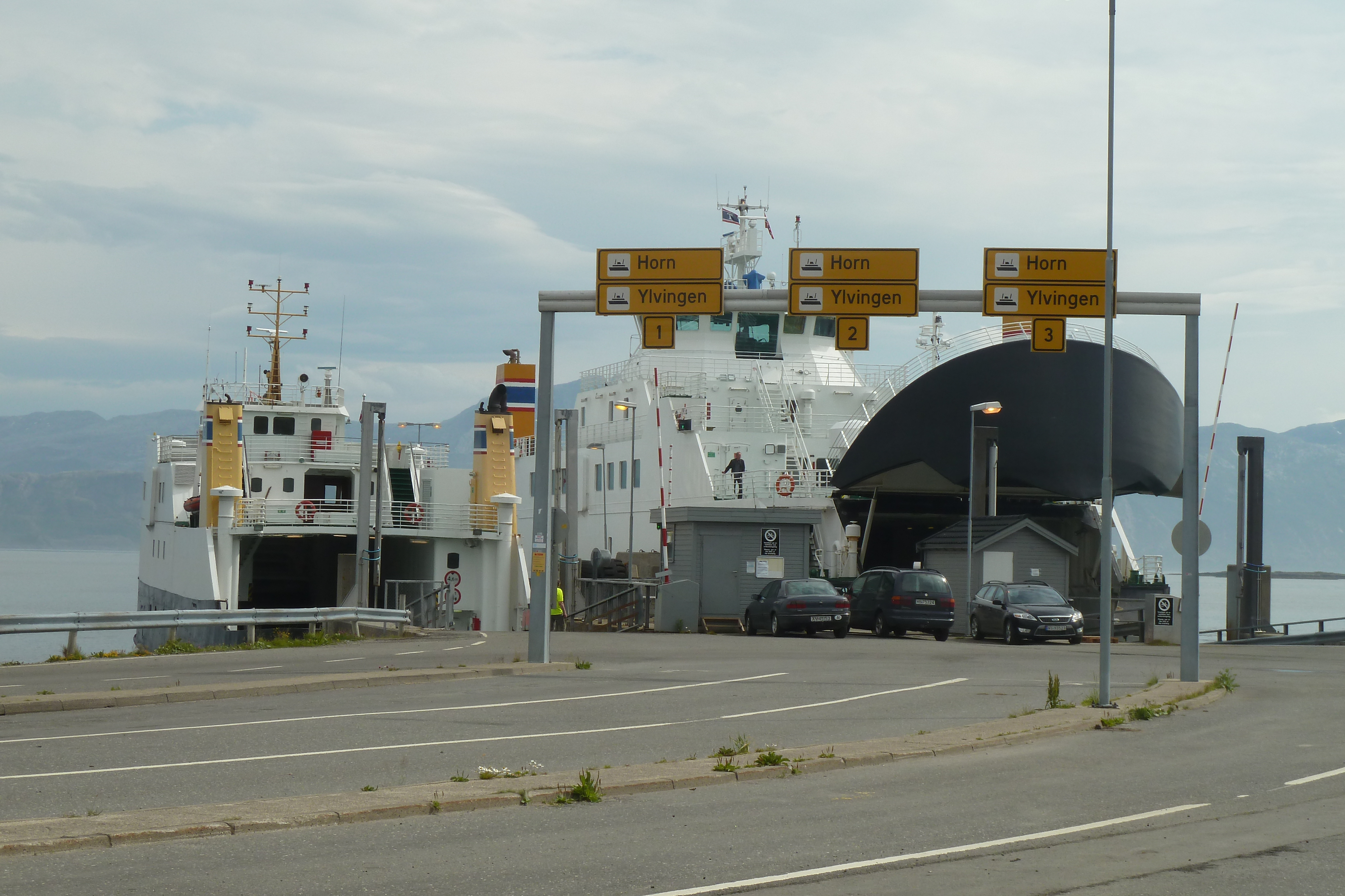 Fergekaia på Igerøy i Vega kommune. "Ramtind" (IMO 7725910 til venstre) og "Torgtind" (IMO 9189445 til høyre) i kaiene.